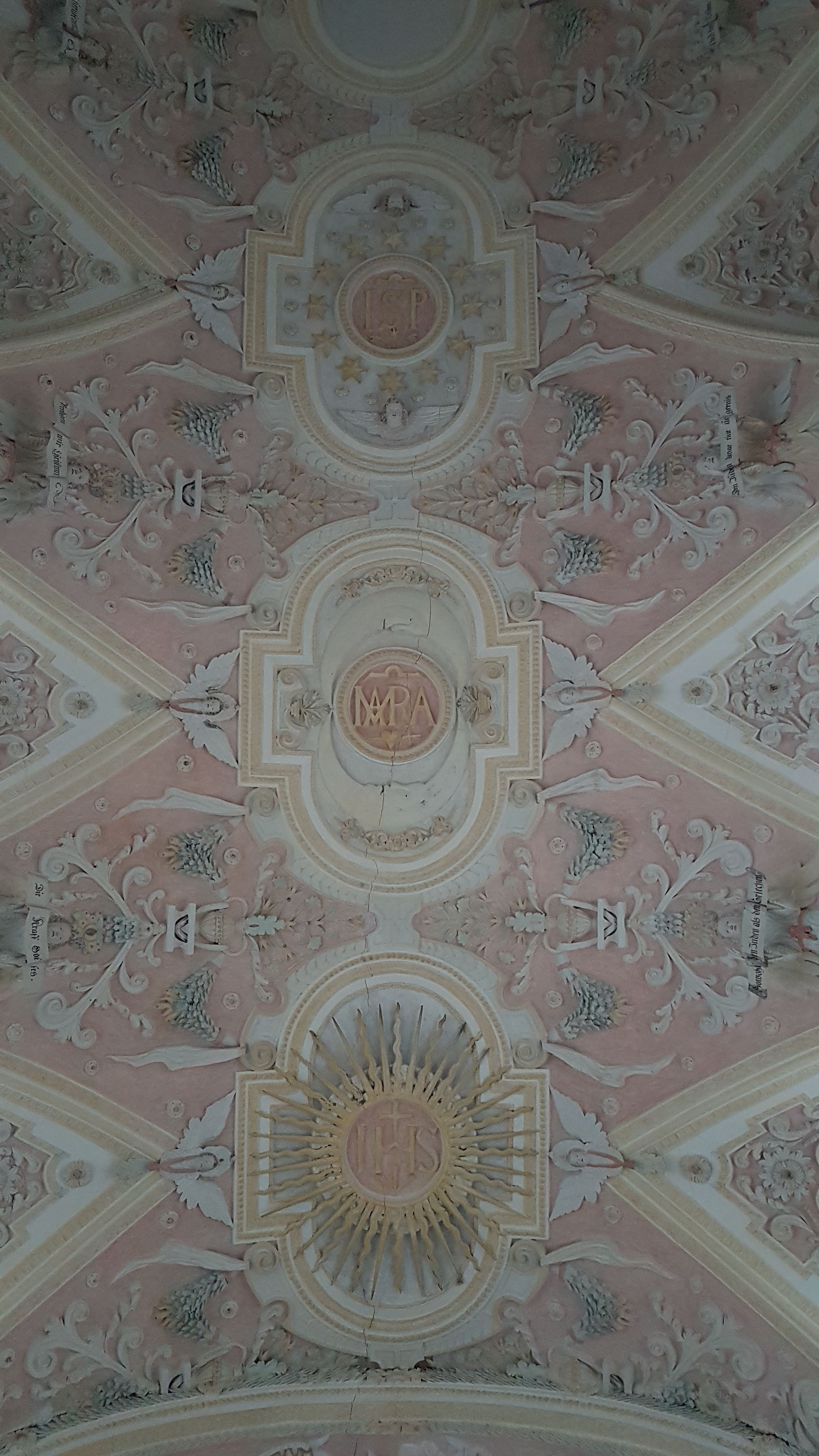 Fischbachau, Elbach, Hl. Blut, Langhausgewölbe mit dem reichen Miesbacher Hochbarock-Stuck der Zwerger-Familie.